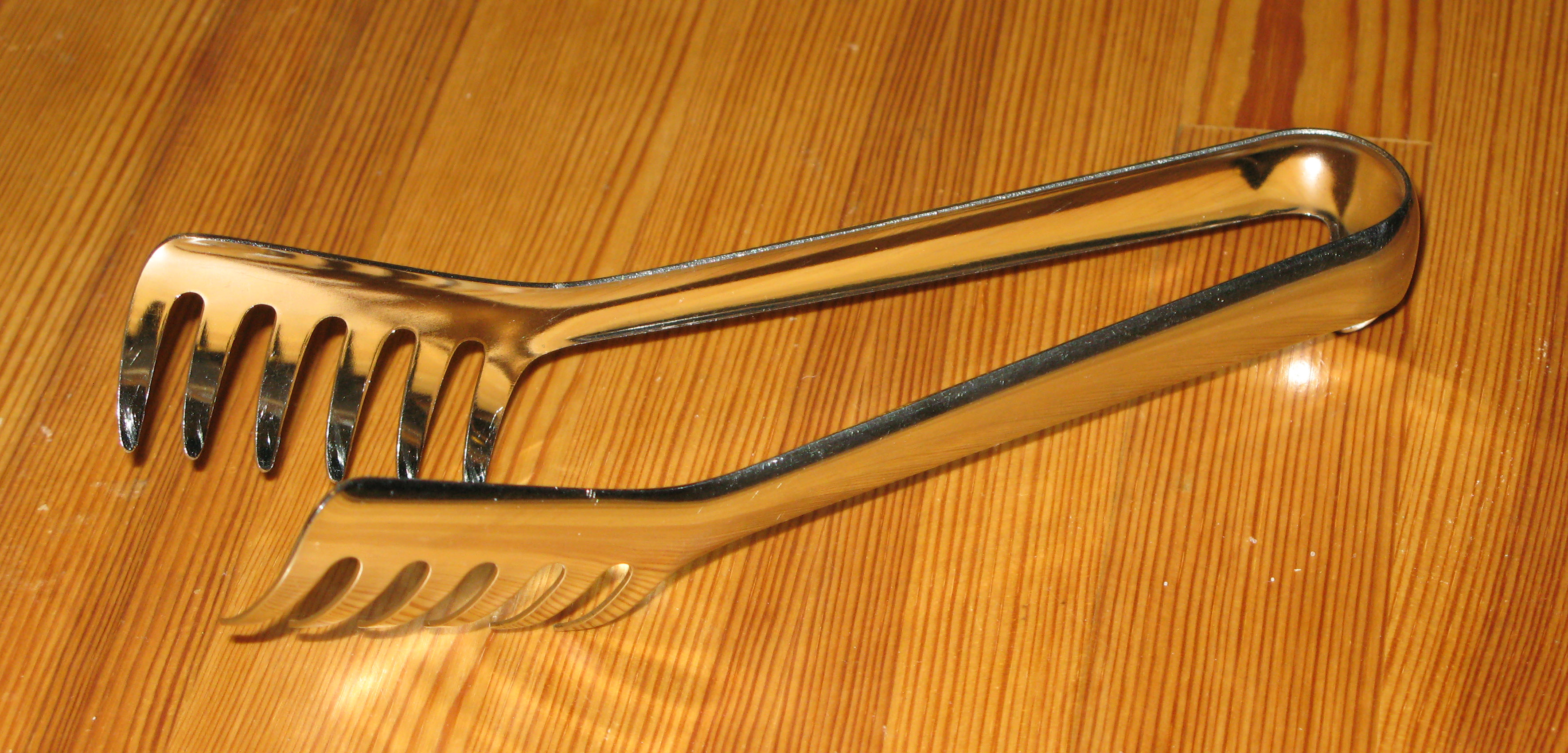 Spaghettizaang. Kategorie:Kichegeschir